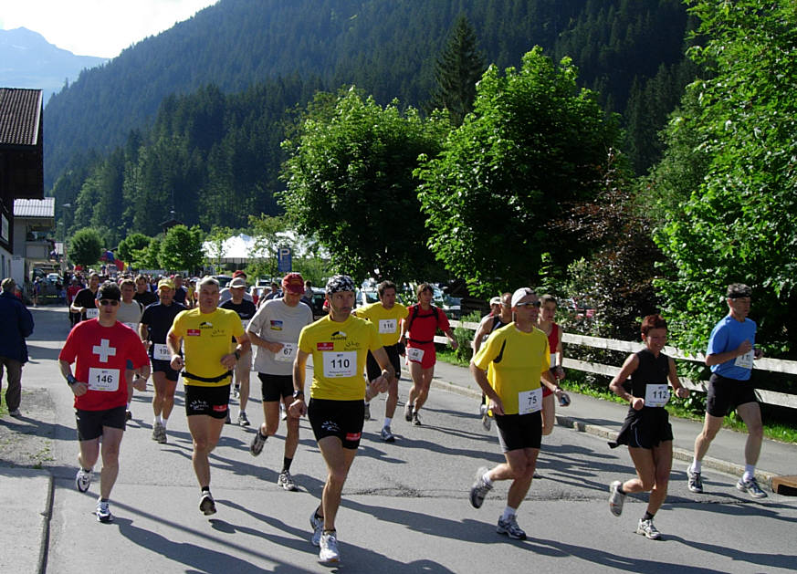 Starterfeld beim Montafon-Arlberg-Marathon 2005